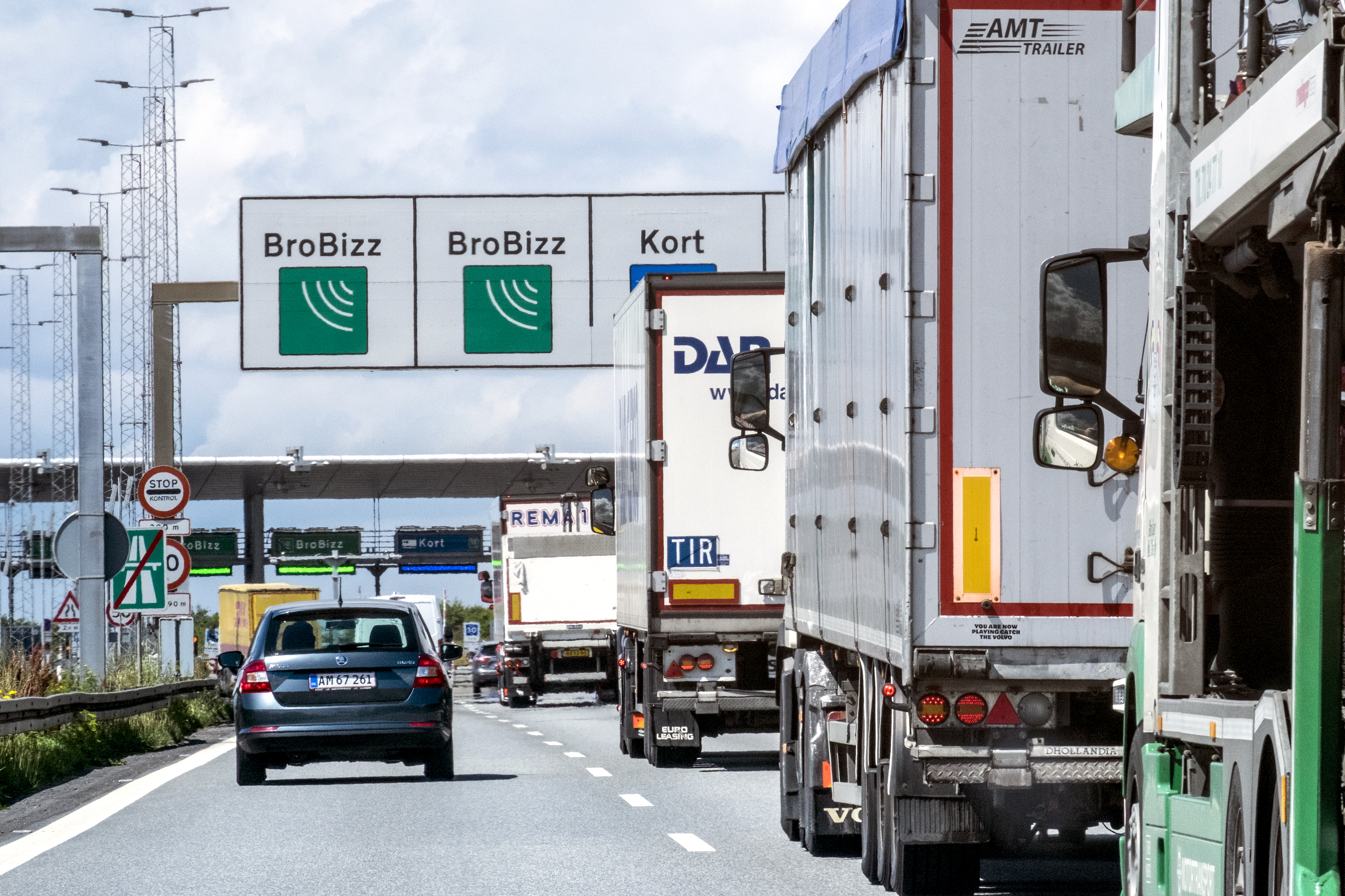 Betalstationen på Fyn till Stora Bæltbroen till Fyn..Photo: News Øresund - Johan Wessman..© News Øresund - Johan Wessman (CC BY 3.0).. .Detta verk av News Øresund är licensierat under en Creative Commons Erkännande 3.0 Unported-licens (CC BY 3.0). Bilden får fritt publiceras under förutsättning att källa anges. .The picture can be used freely under the prerequisite that the source is given. News Øresund, Malmö, Sweden.News Øresund är en oberoende regional nyhetsbyrå som är en del av det oberoende dansk-svenska kunskapscentrat Øresundsinstituttet...